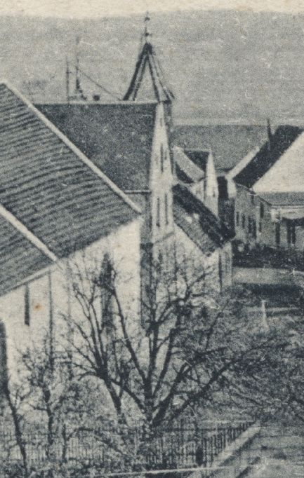 Blick auf das Gemeindehaus von Westerhüsen (mit Turm), Aufnahme vermutlich schon in den 1890ern